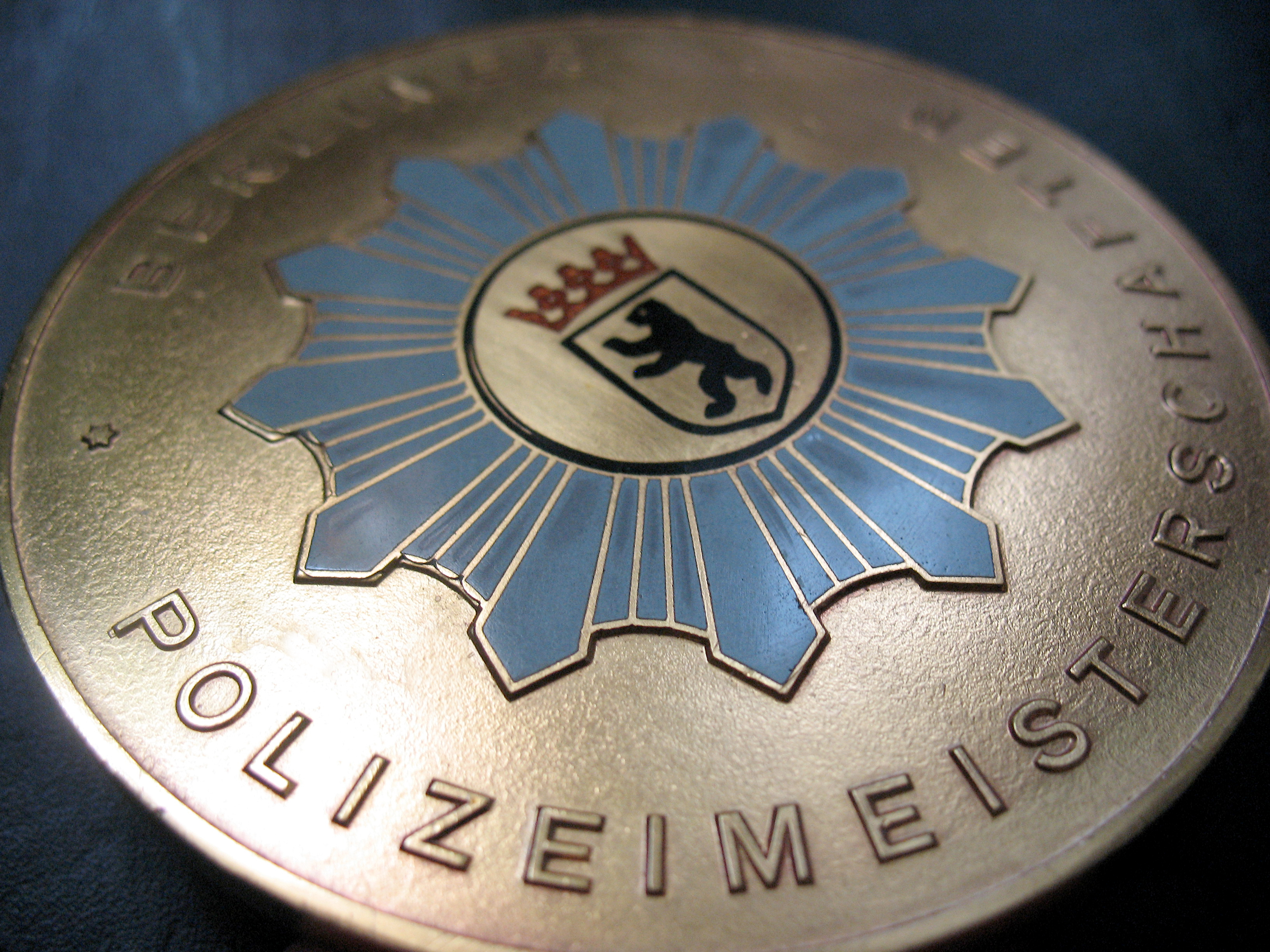 +0000000001_Image_Gewinnermedaille_Polizeimeisterschaften